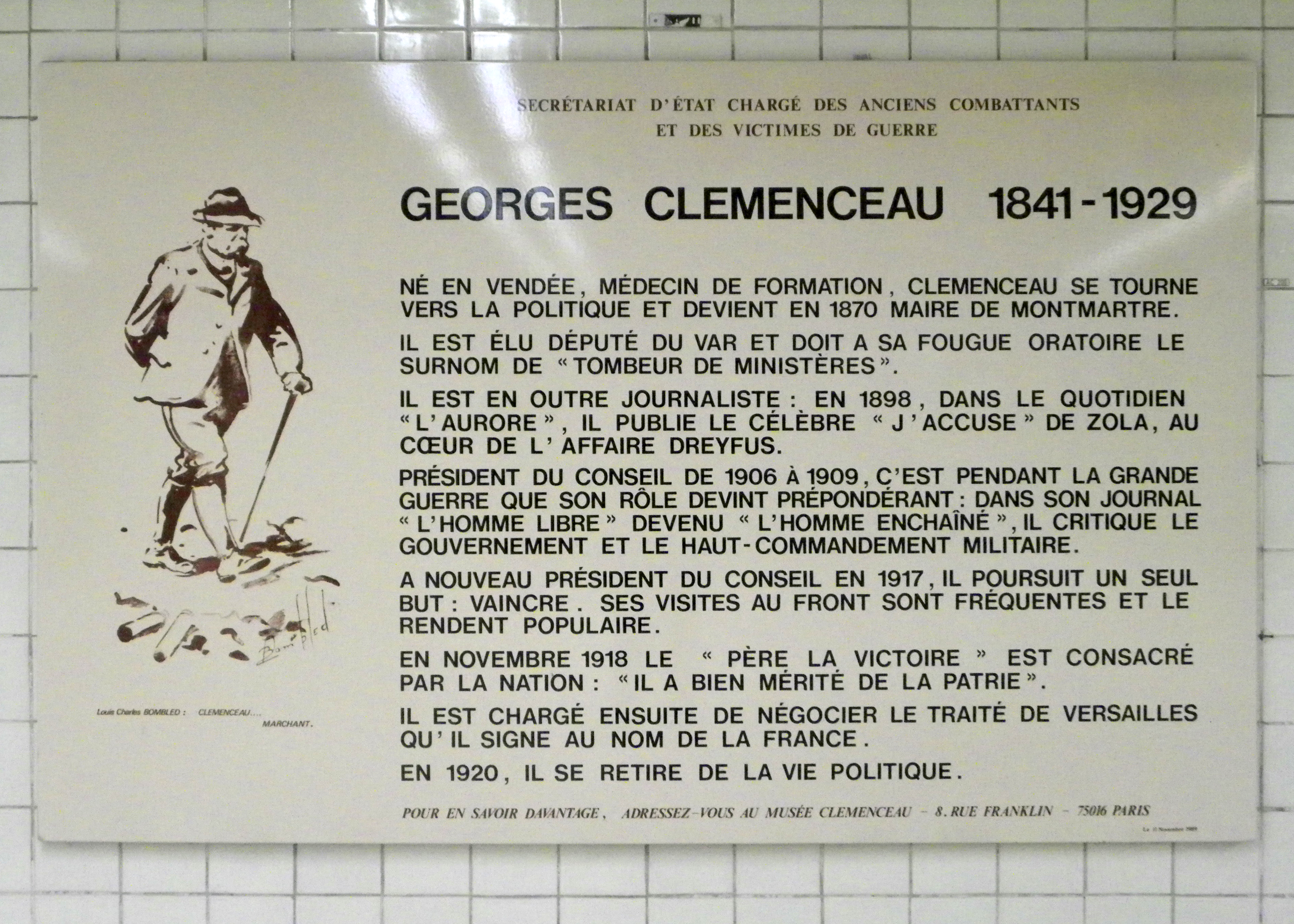 Plaque concernant Georges Clemenceau dans la station Champs-Élysées - Clemenceau du métro de Paris.